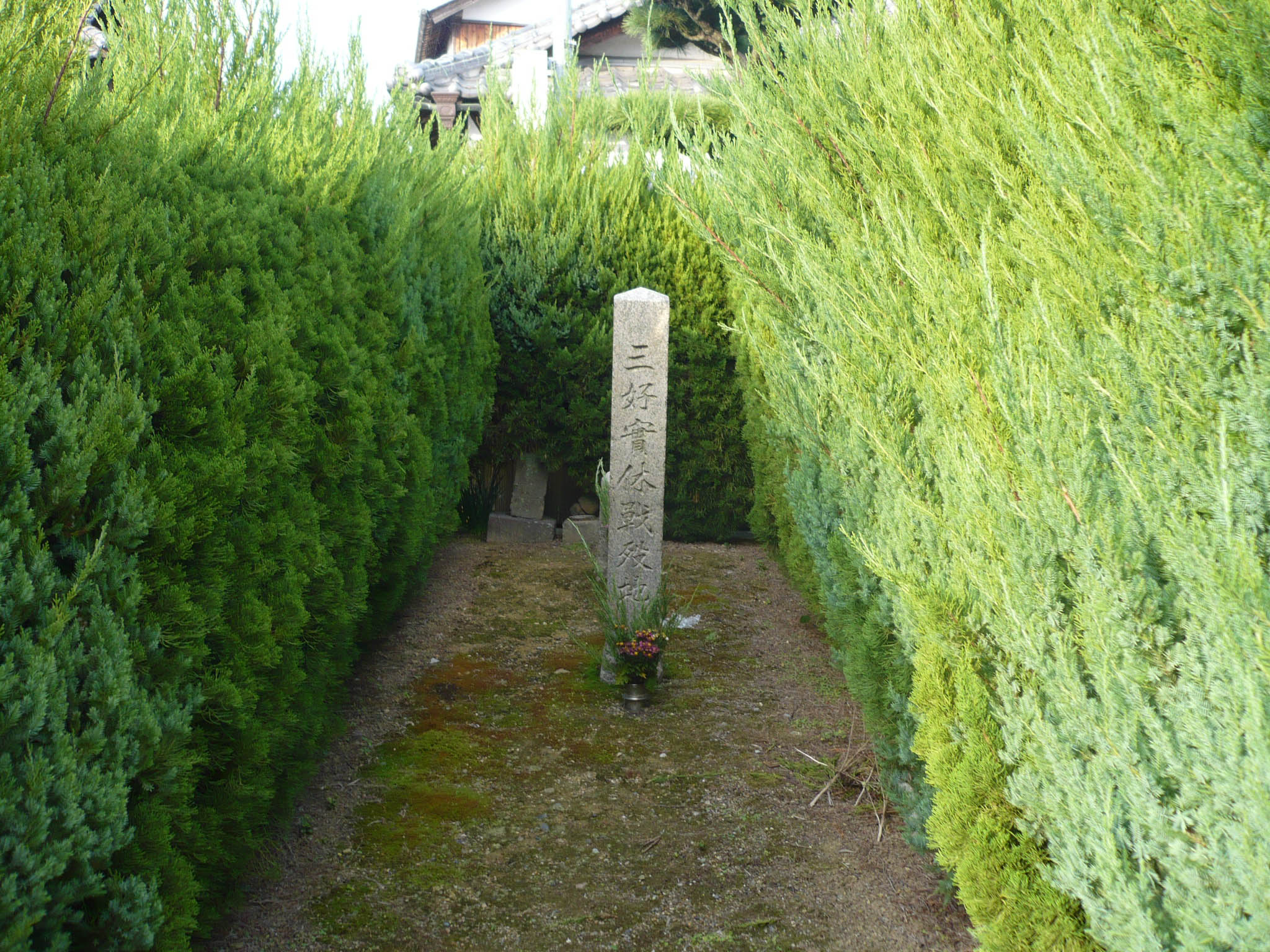 三好義賢戦没地石標